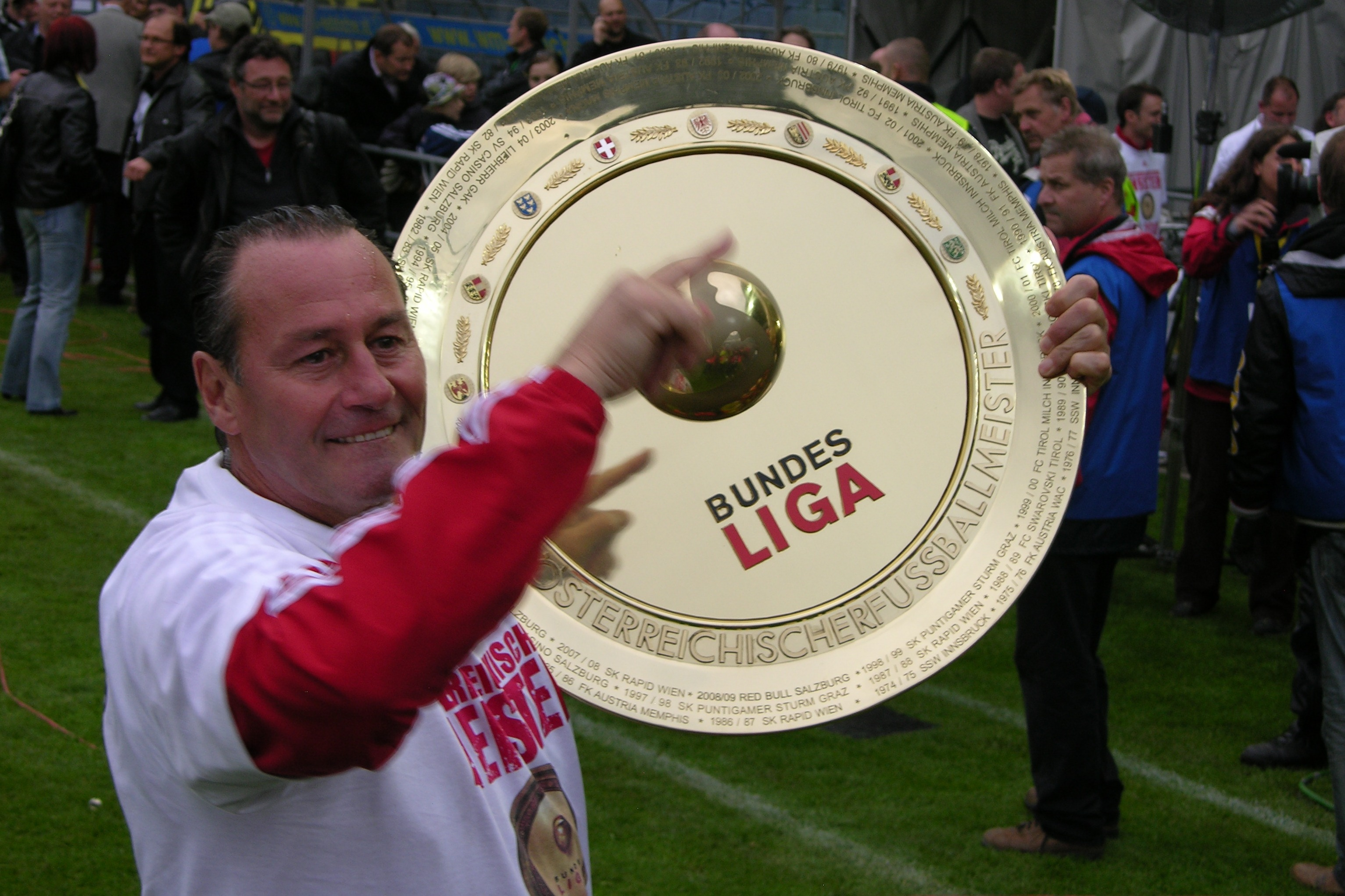 Bundesligameisterschaftsfinale 2009/2010 Sturm : Salzburg